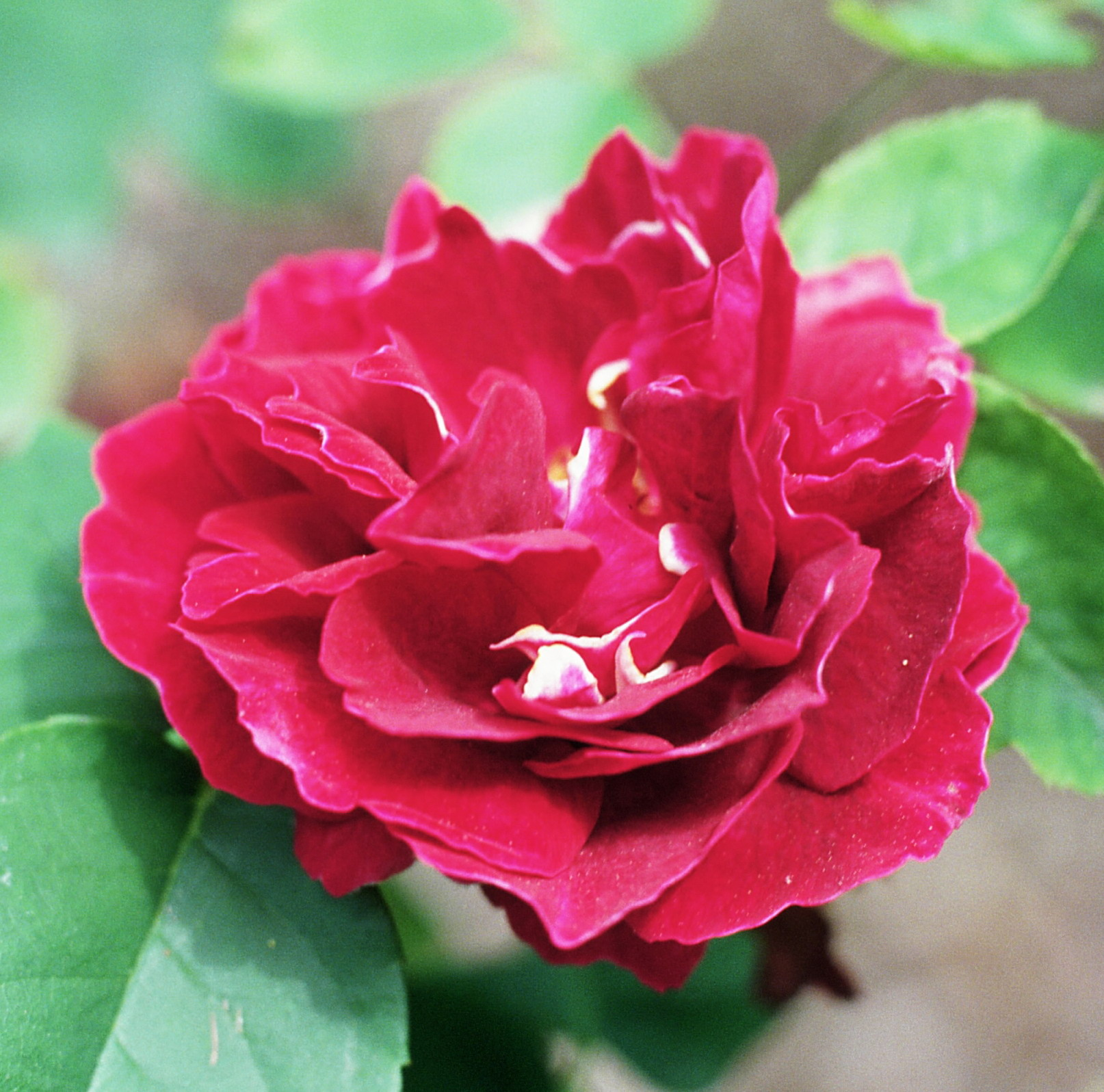 Rosa 'Baron Girod de l' Ain', Híbridos reflorecientes, sect. Rosa. Real Jardín Botánico, Madrid, mayo 1988, A. Barra